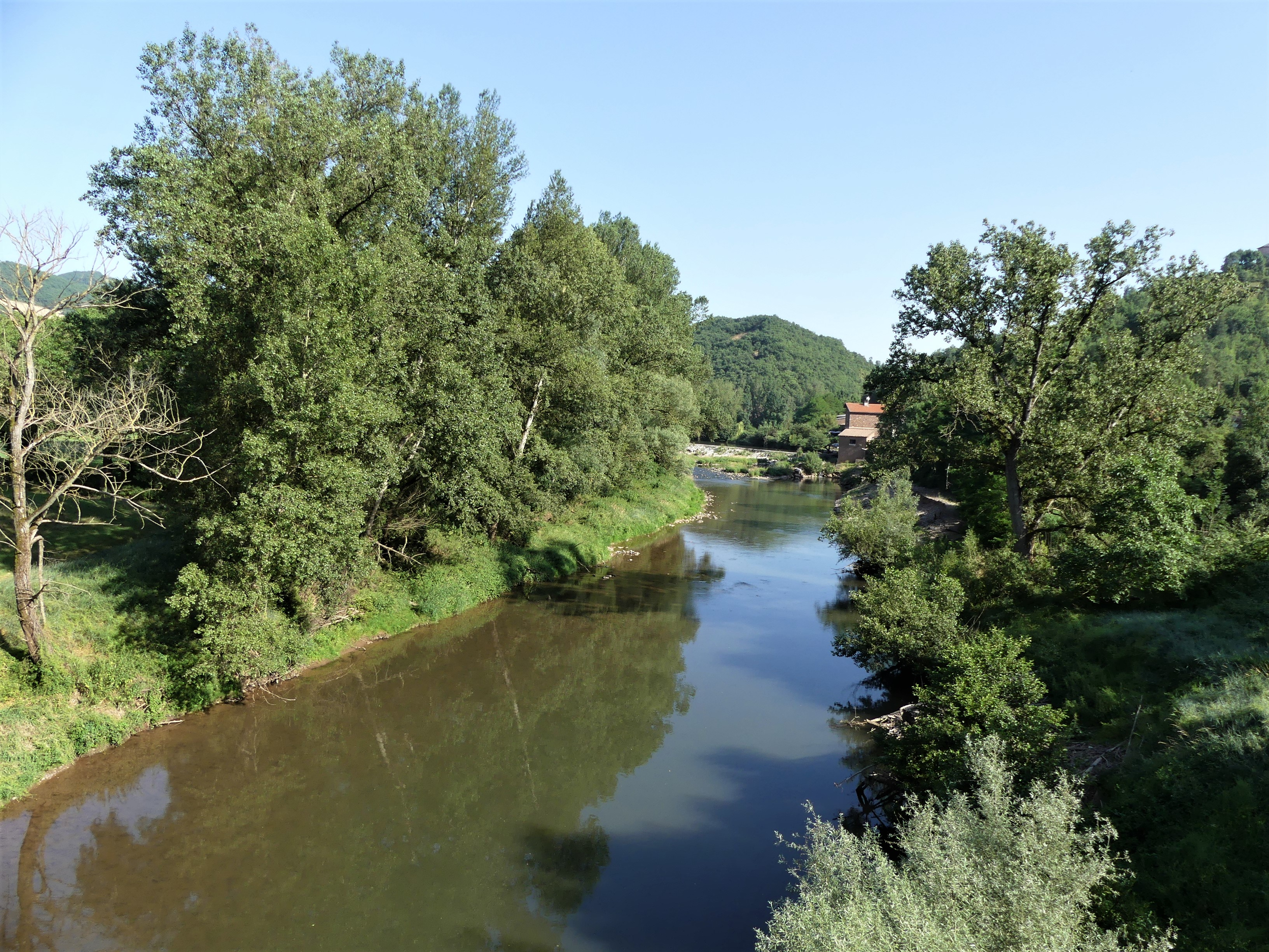 Le Dourdou au pont de la route départementale 632, le Viala du Dourdou, Calmels-et-le-Viala, Aveyron, France. Vue prise en direction de l'amont.